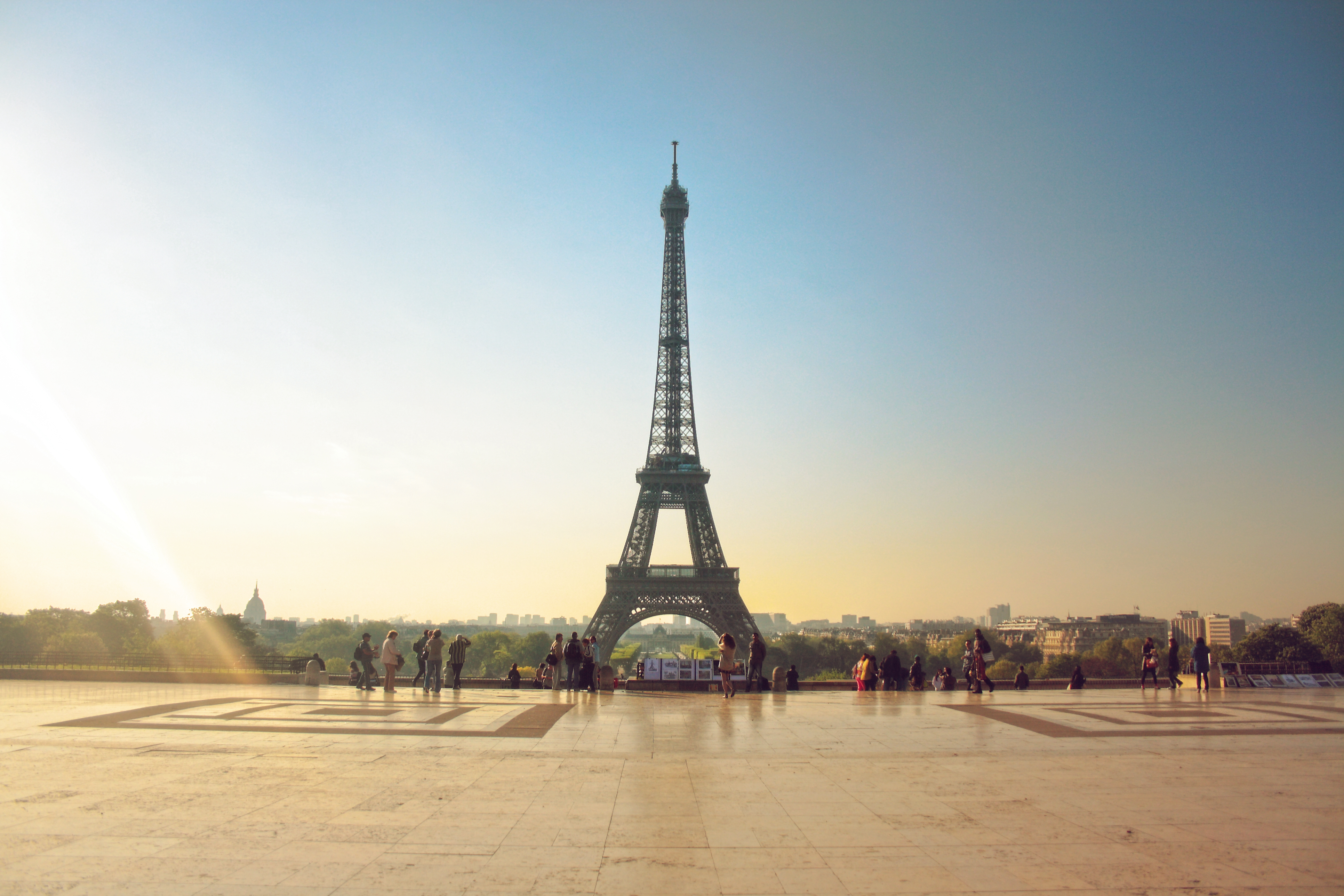 Desde el Trocadero París, Francia